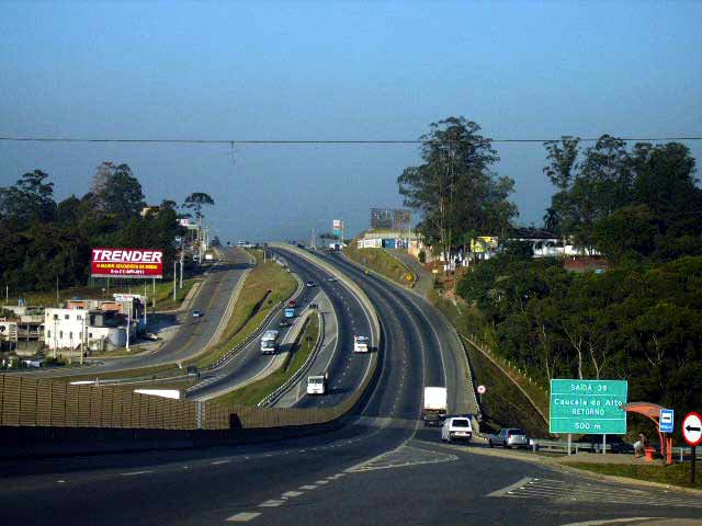 Trecho da Rodovia Raposo no km 39 (Bairro Caucaia do Alto) na cidade de Cotia